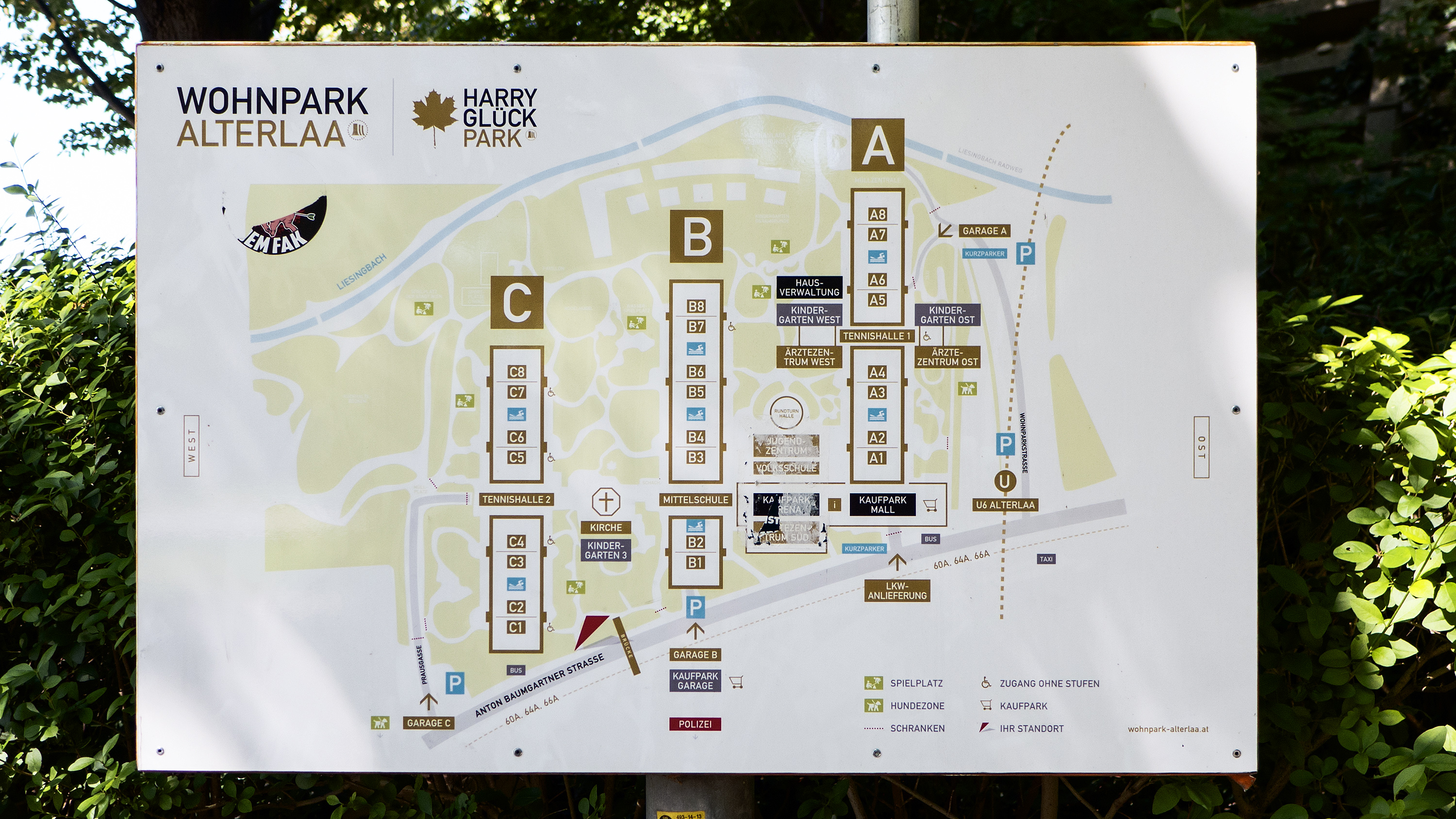 Harry-Glück-Park in Wien 23